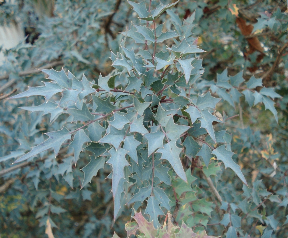 Mahonia fremontii - Leaves